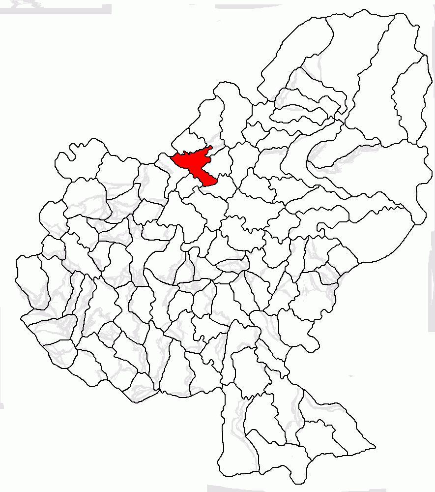 Categorie:Hărţi ale judeţului Mureş